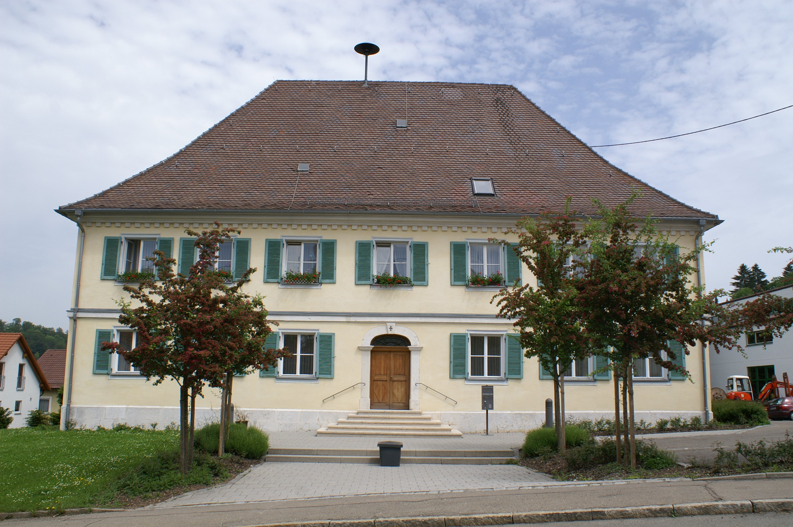 Das imposante ehemalige Amtshaus aus dem Jahr 1793 ist heute Sitz der Ortsverwaltung Arnegg (Blaustein, Alb-Donau-Kreis)